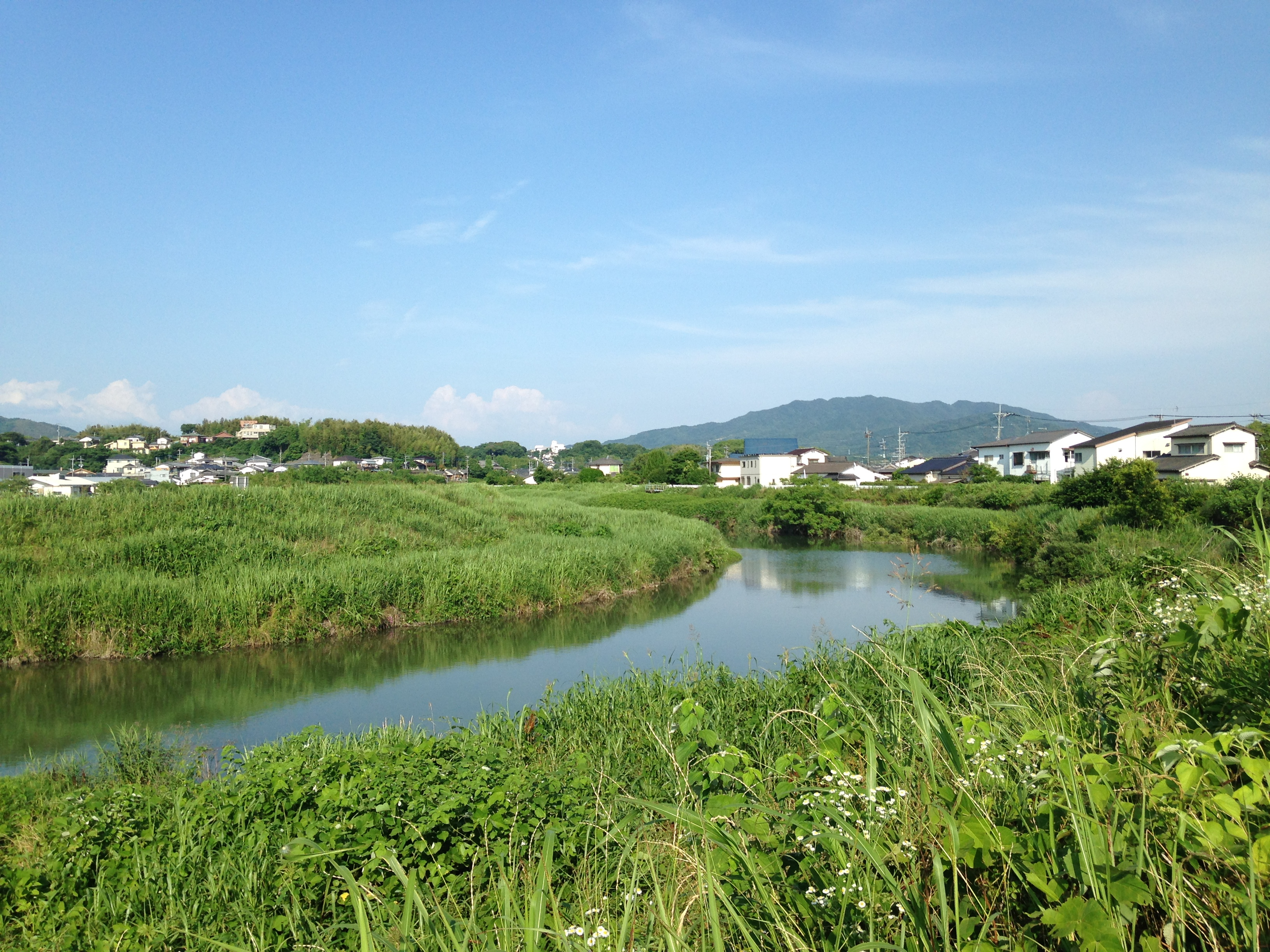 県境付近より望む諏訪川(上流側)と三池山